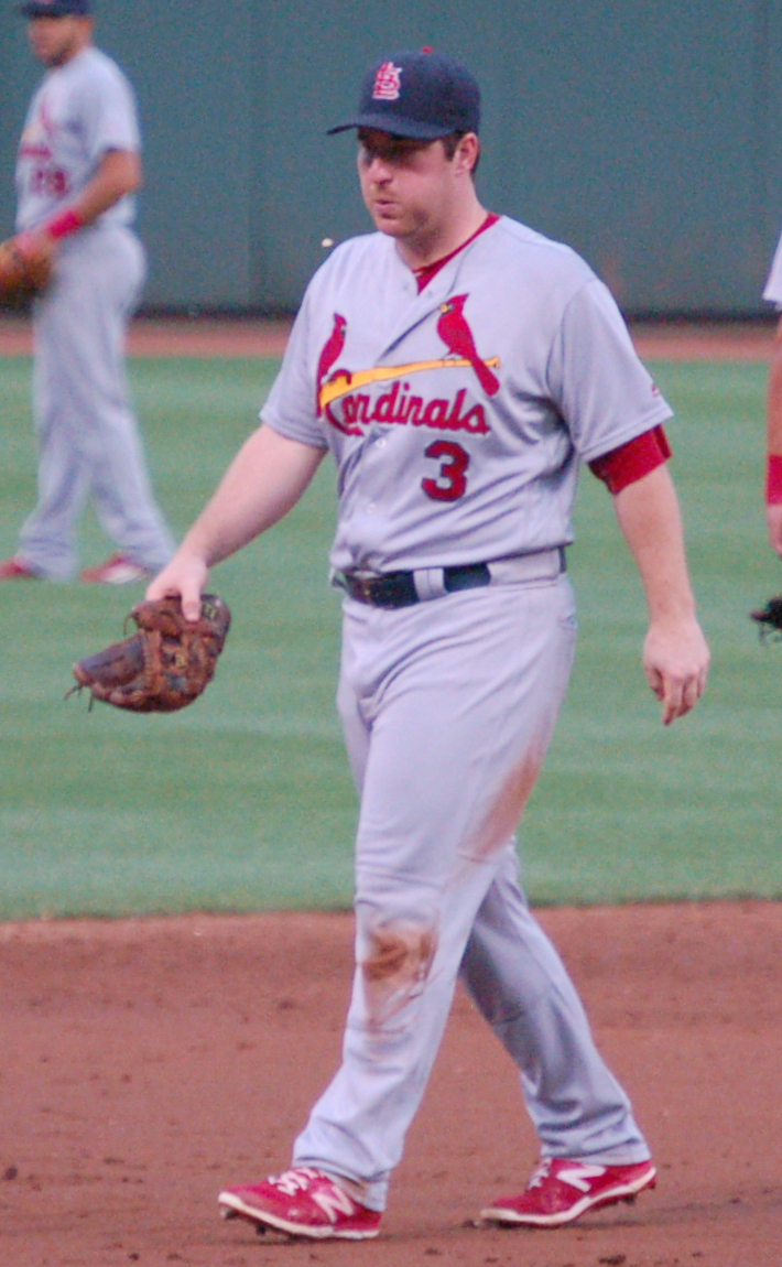 Jedd Gyorko